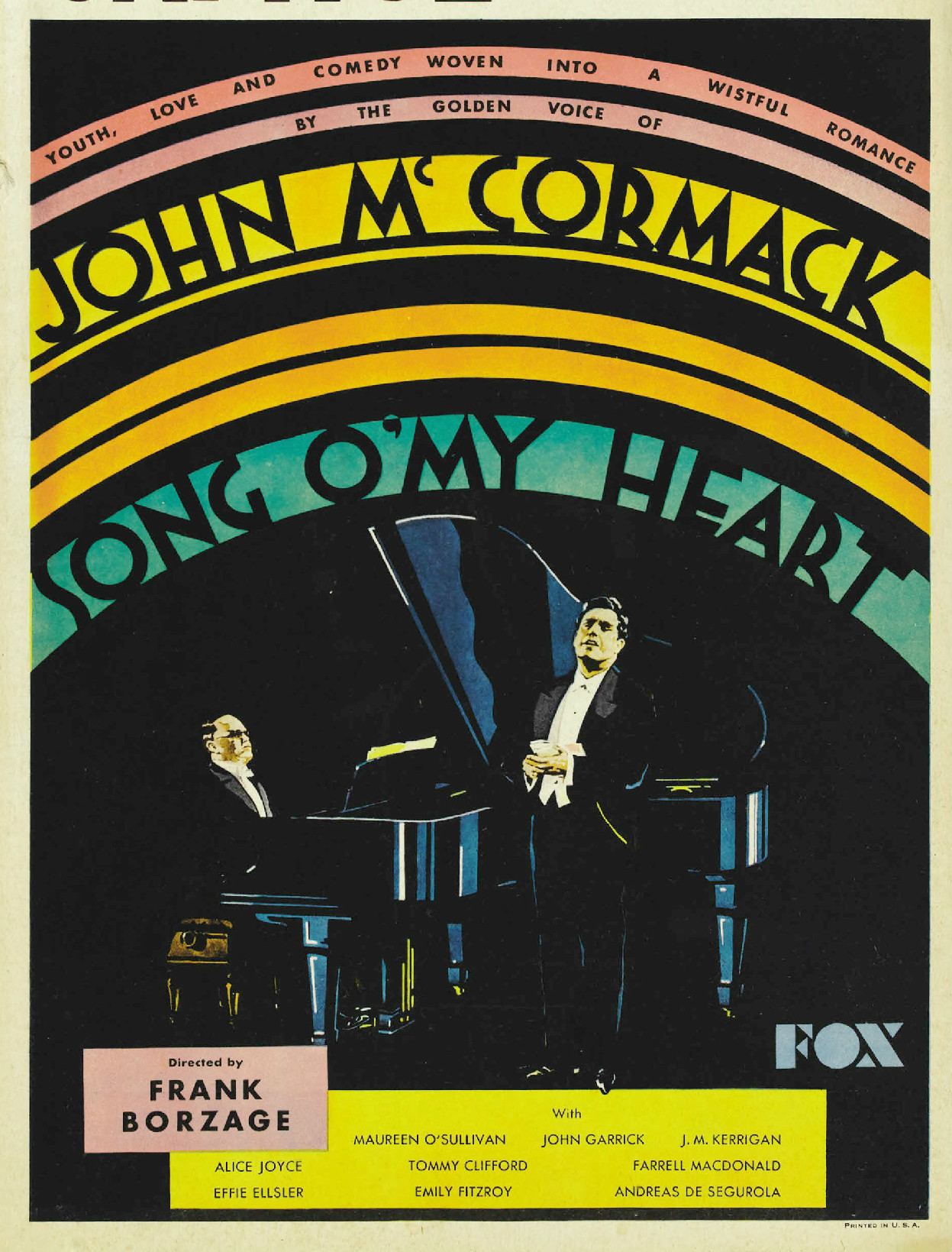 Cartel anunciador de la película estadounidense La canción de mi alma (Song o' My Heart), dirigida por Frank Borzage en 1930.